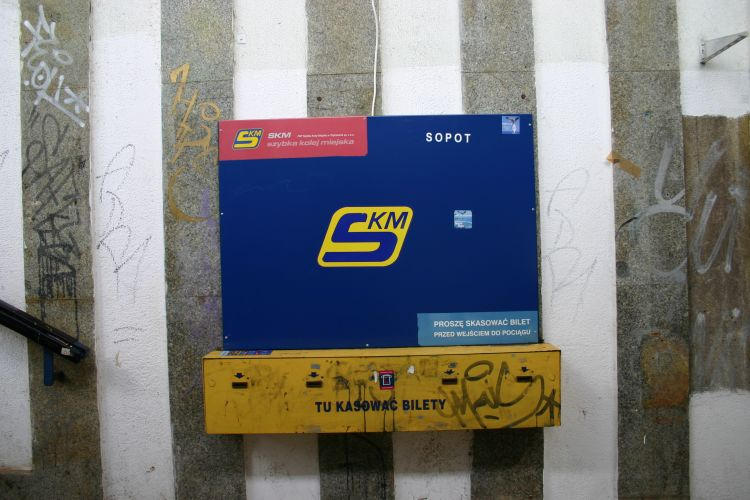 Fahrkarten-Entwerter der SKM